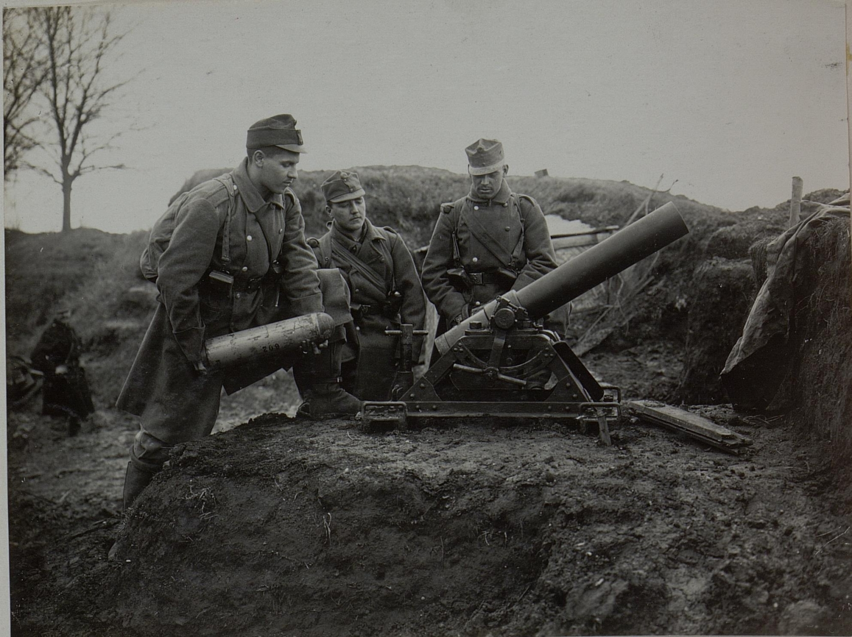 12 cm Minenwerfer - Sperrfort "Dubno"